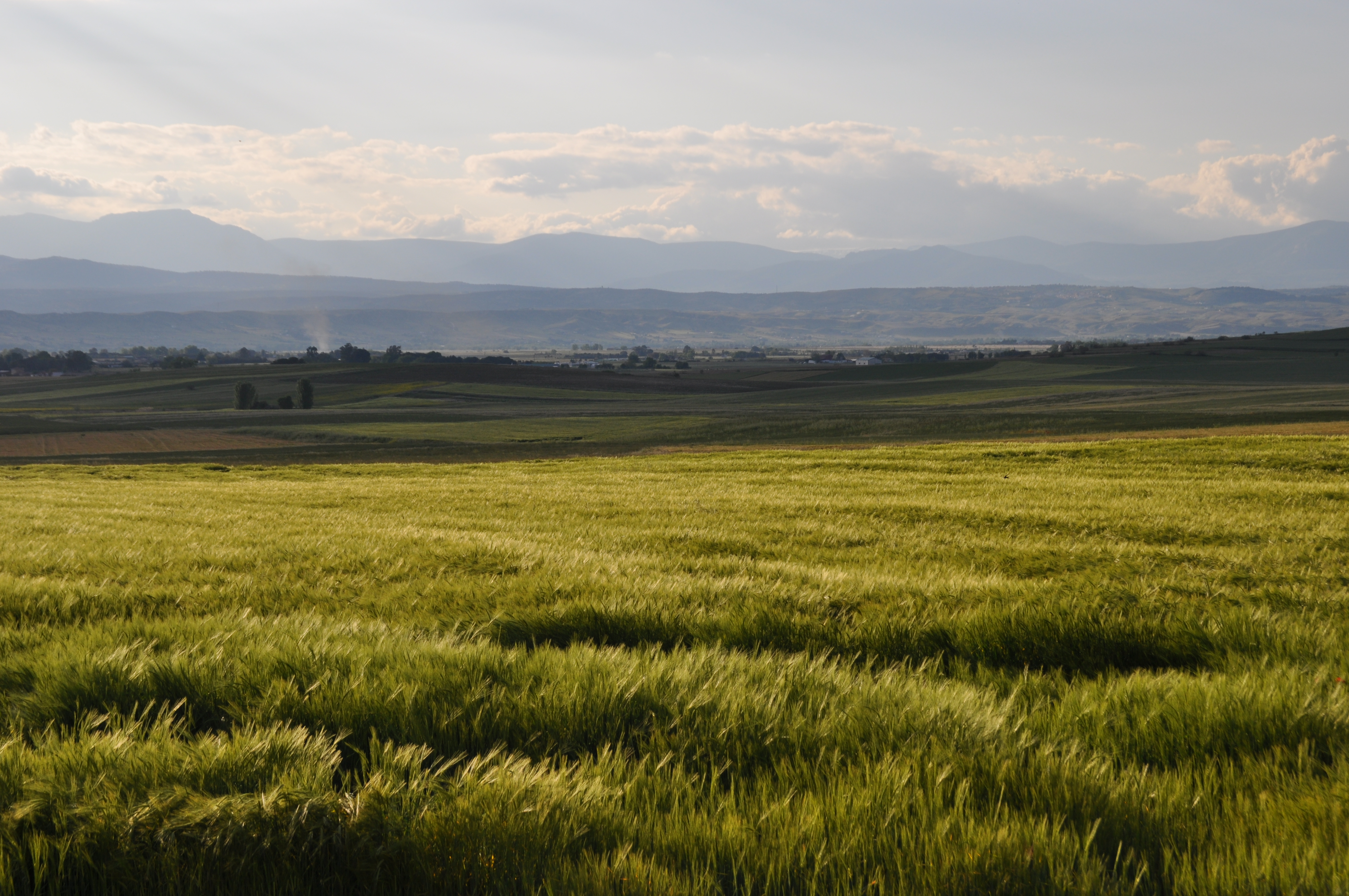 ES3110001